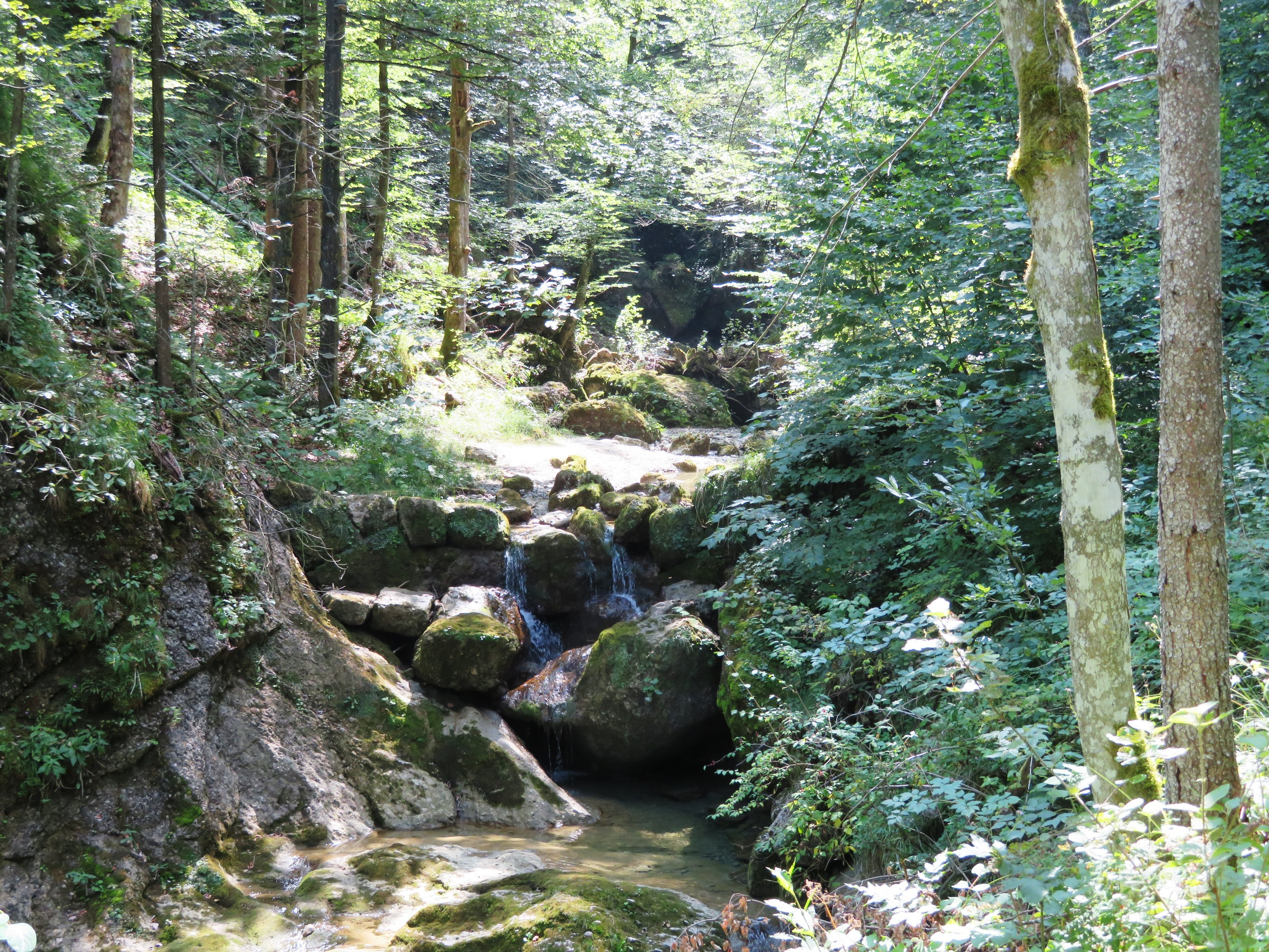 Steigbachtobel